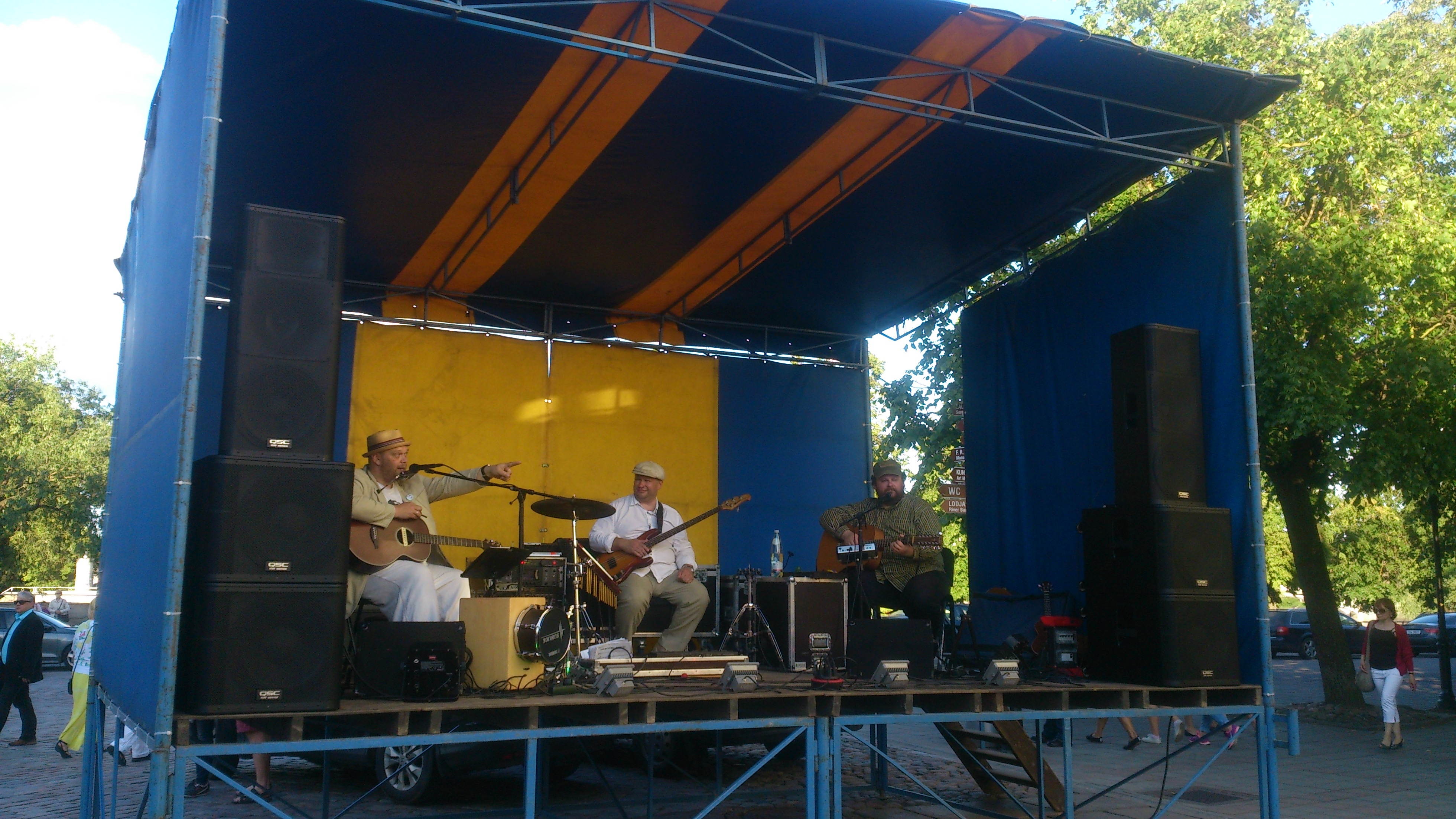 Kõrsikud Tartu päeval 29. juunil 2015 raeplatsil